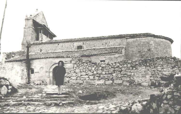 Iglesia - Hinojosa del Cerro (Segovia) - Fotografía B/N